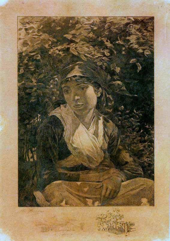 Camponesa (água-forte, 31 x 22,3 cm)